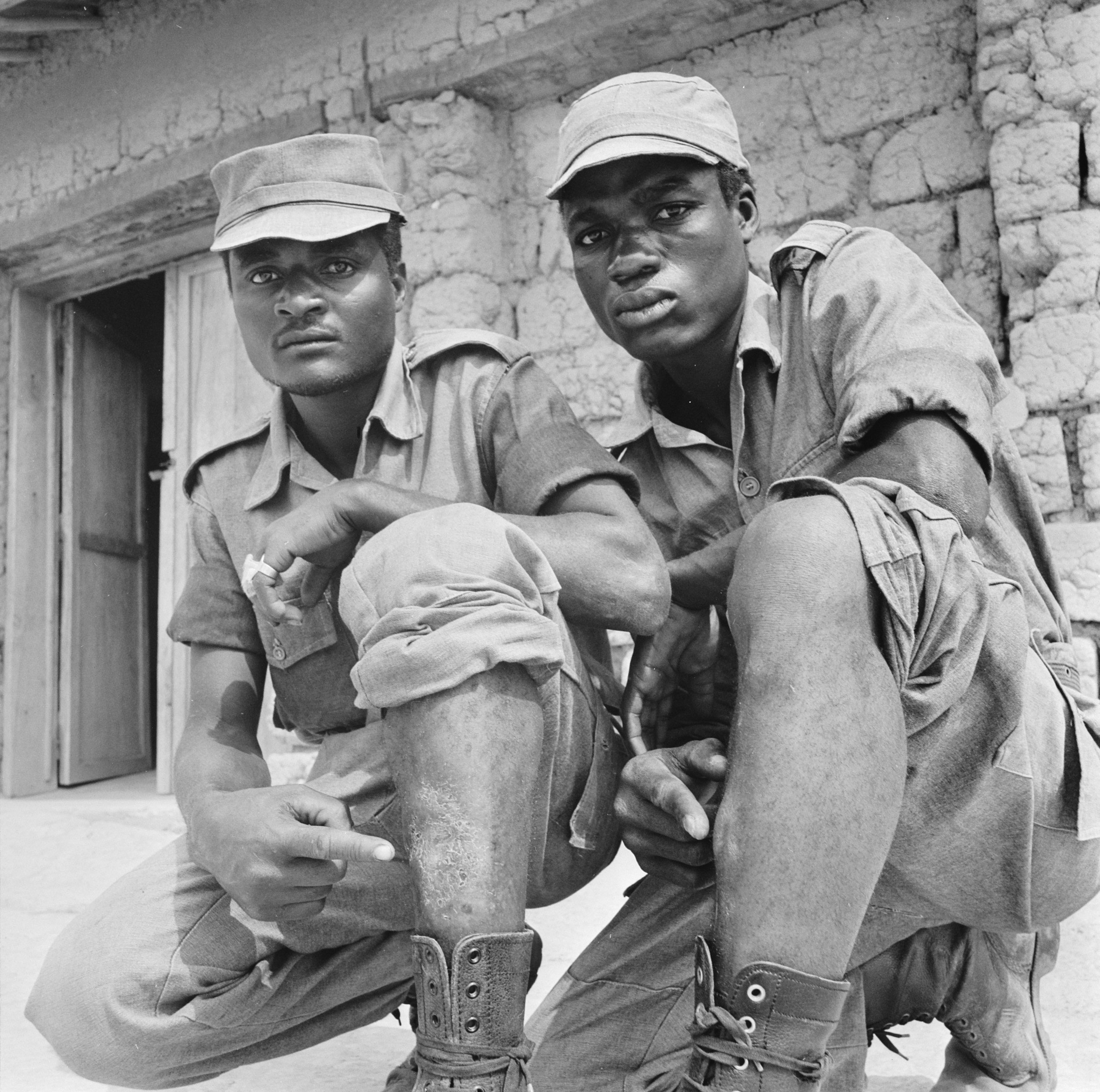 Collectie / Archief : Fotocollectie Anefo Reportage / Serie : [ onbekend ] Beschrijving : Kamp van Angolese Bevrijdingsbeweging FNLA in Zaire, leden bevrijdingsbeweging in het kamp Datum : 22 augustus 1973 Locatie : Zaïre Trefwoorden : Bevrijdingsbewegingen, kampen, leden Persoonsnaam : FNLA Fotograaf : Mieremet, Rob / Anefo Auteursrechthebbende : Nationaal Archief Materiaalsoort : Negatief (zwart/wit) Nummer archiefinventaris : bekijk toegang 2.24.01.03 Bestanddeelnummer : 926-6276